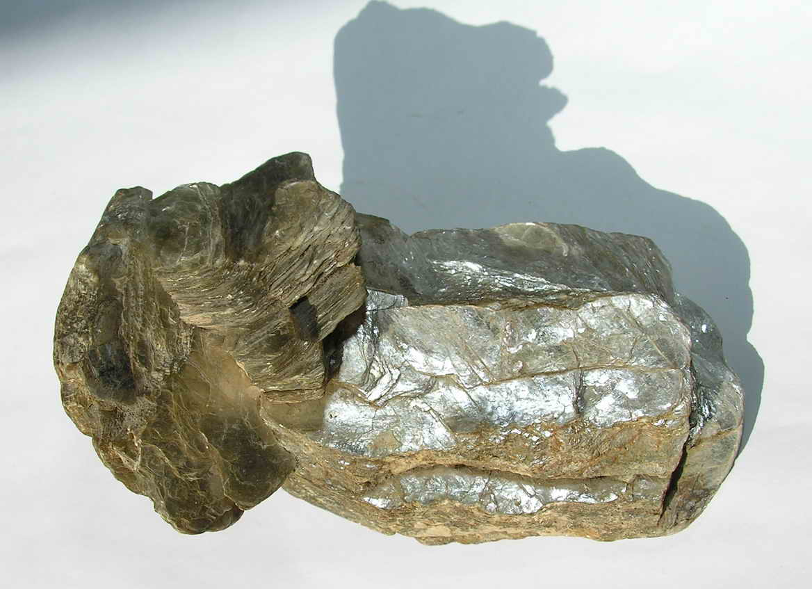 Mica